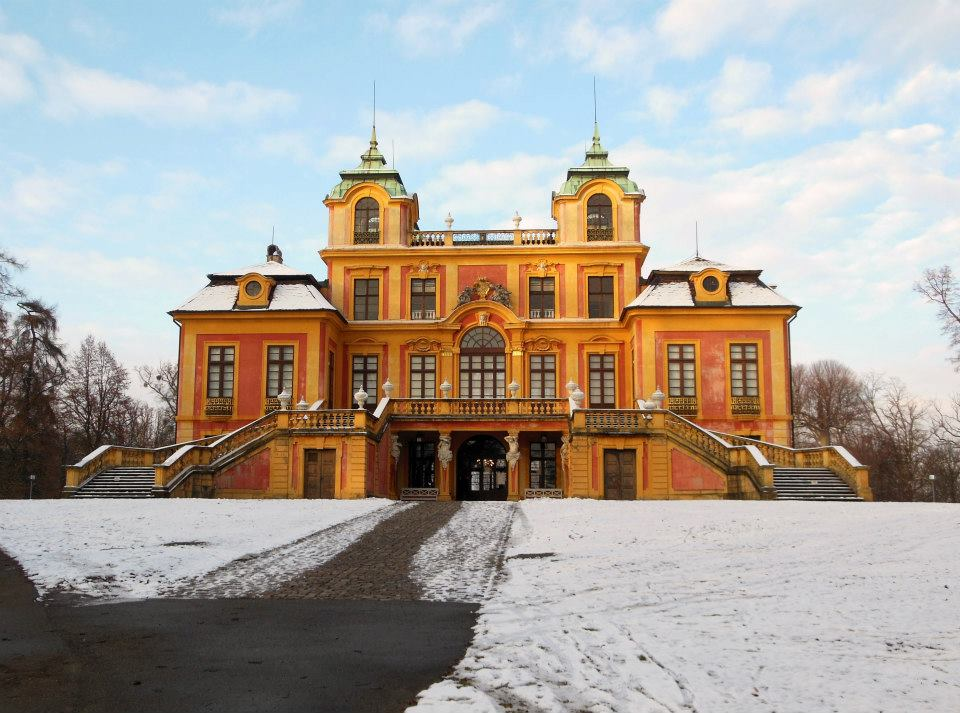 Photographie du château Favorite de Ludwigsburg (Bade-Wurtemberg, Allemagne).